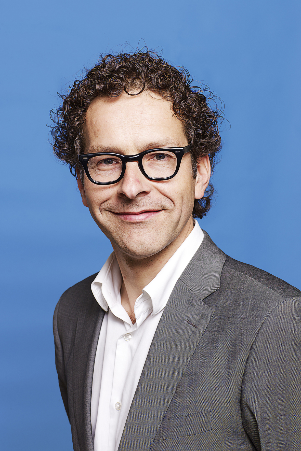 Jeroen Dijsselbloem, Tweede Kamerlid. Foto: Lex Draijer.